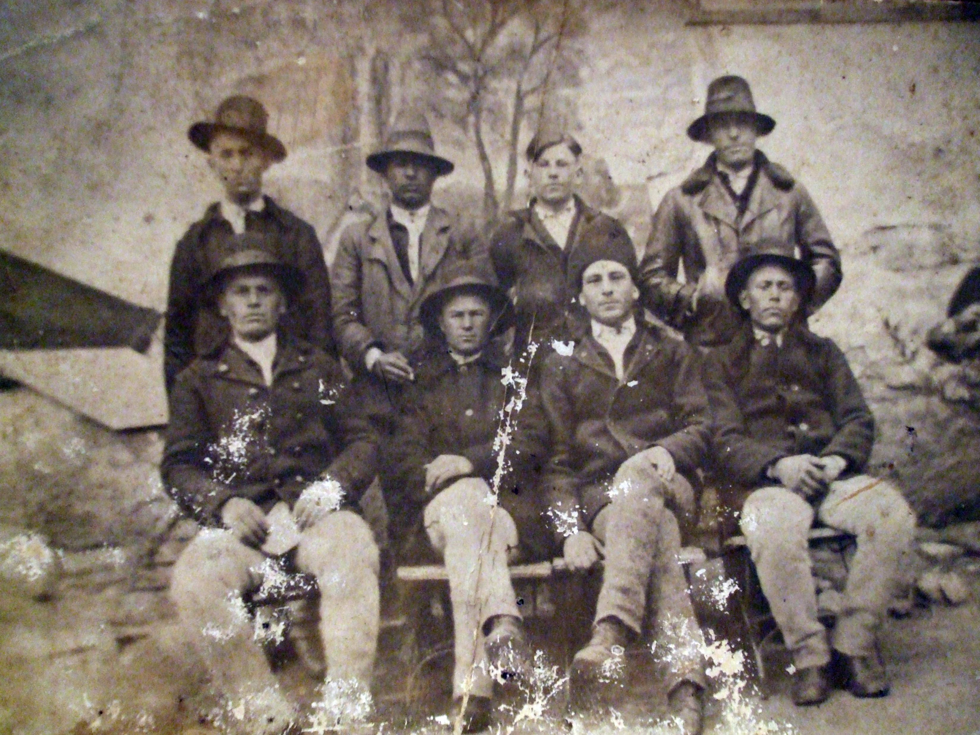 Tineri din Aruncuta ,"leatul" 1915 - într-o fotografie din anul 1933 , cind au fost luați in evidența militară , ulterior participanți in prima linie la puternicile lupte din Rusia